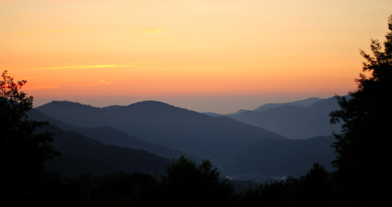 Перевал Ноль между сёлами Солохаул и Харциз Первый